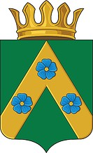 Герб Пудожского района, Карелия